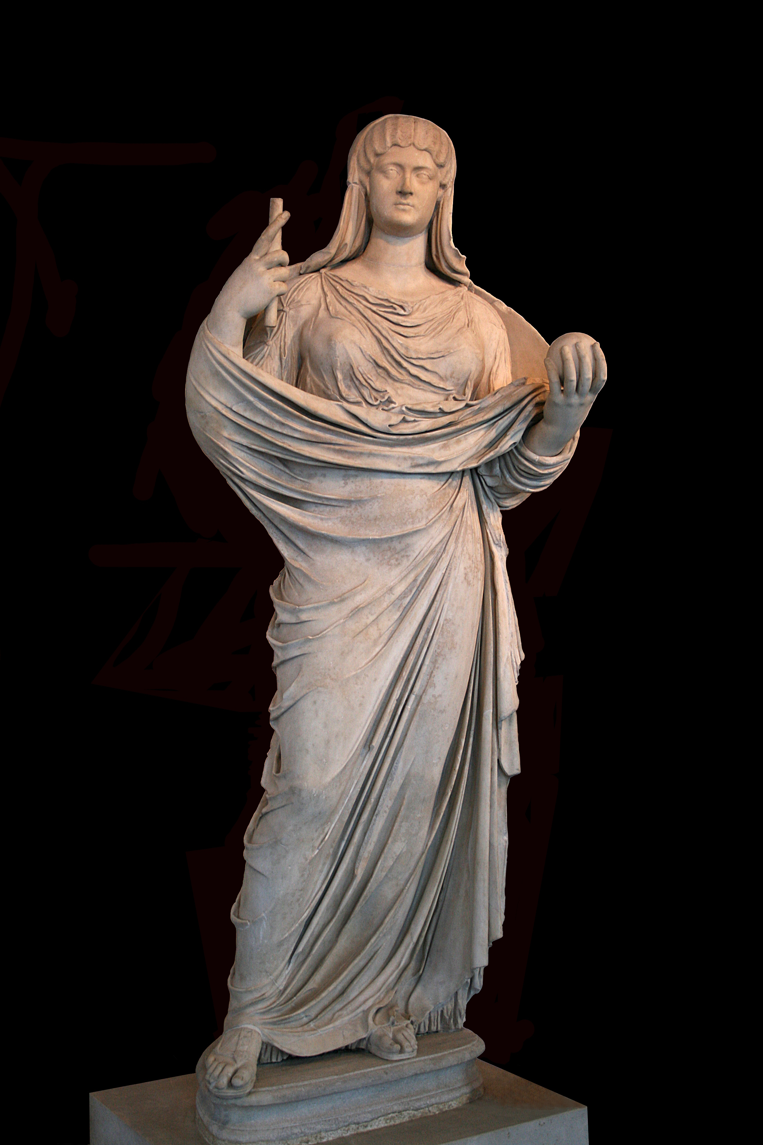 Faustina Minor (Faustine la jeune) réalisée en 165 ap. J.-C. - Palazzo Massimo alle Terme - Rome (Italie).